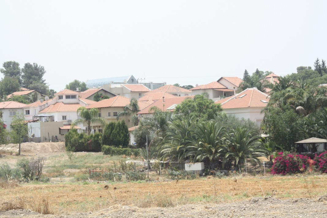 Beit Hashmonay בית חשמונאי